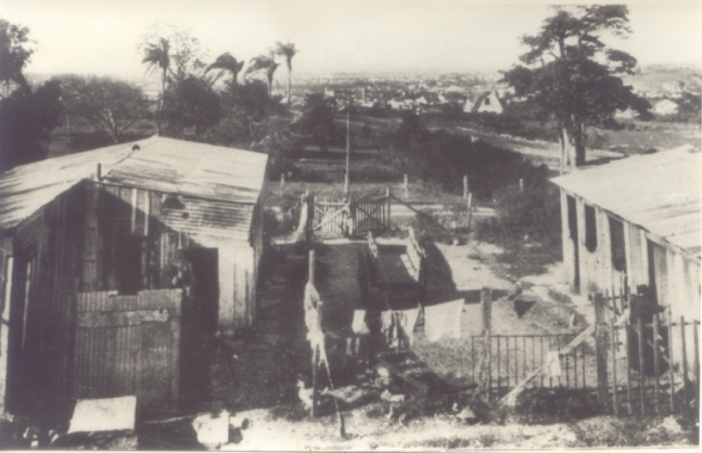 Casebres da antiga "Colônia Africana", em Porto Alegre, Brasil, área em que se instalaram os escravos recém-libertos e que corresponde hoje ao bairro Rio Branco.